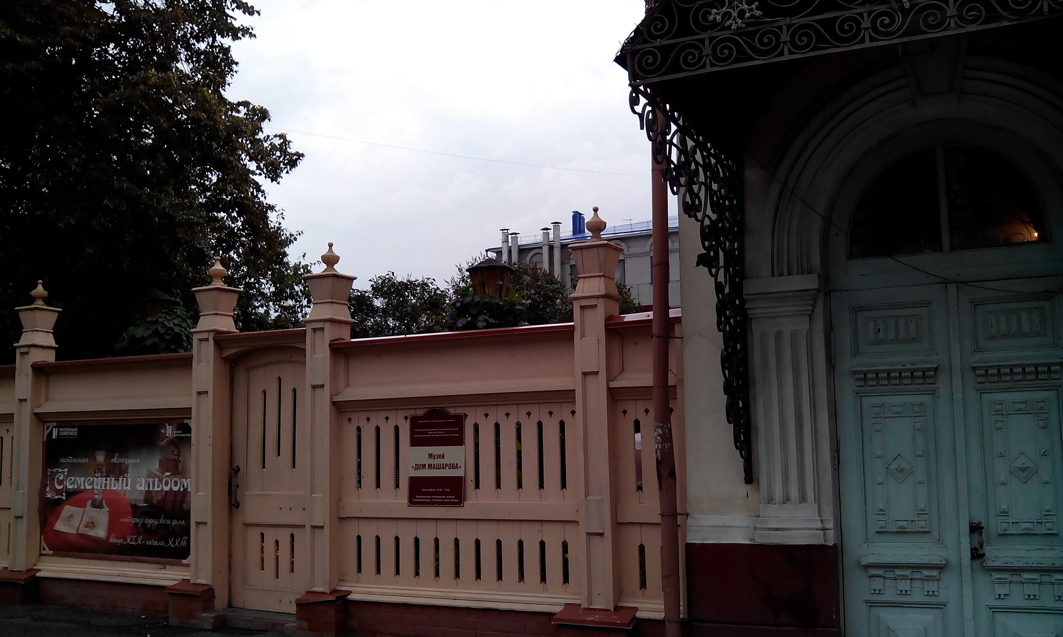 Дом жилой (Тюменская область, Тюмень, улица Ленина, 24)